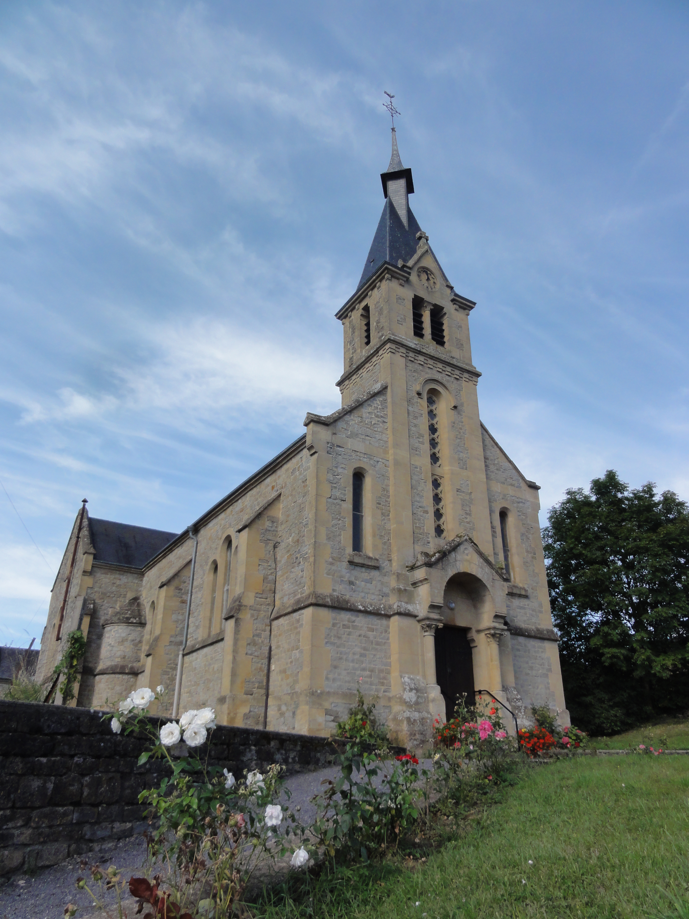 Le Châtelet-sur-Sormonne (Ardennes) église